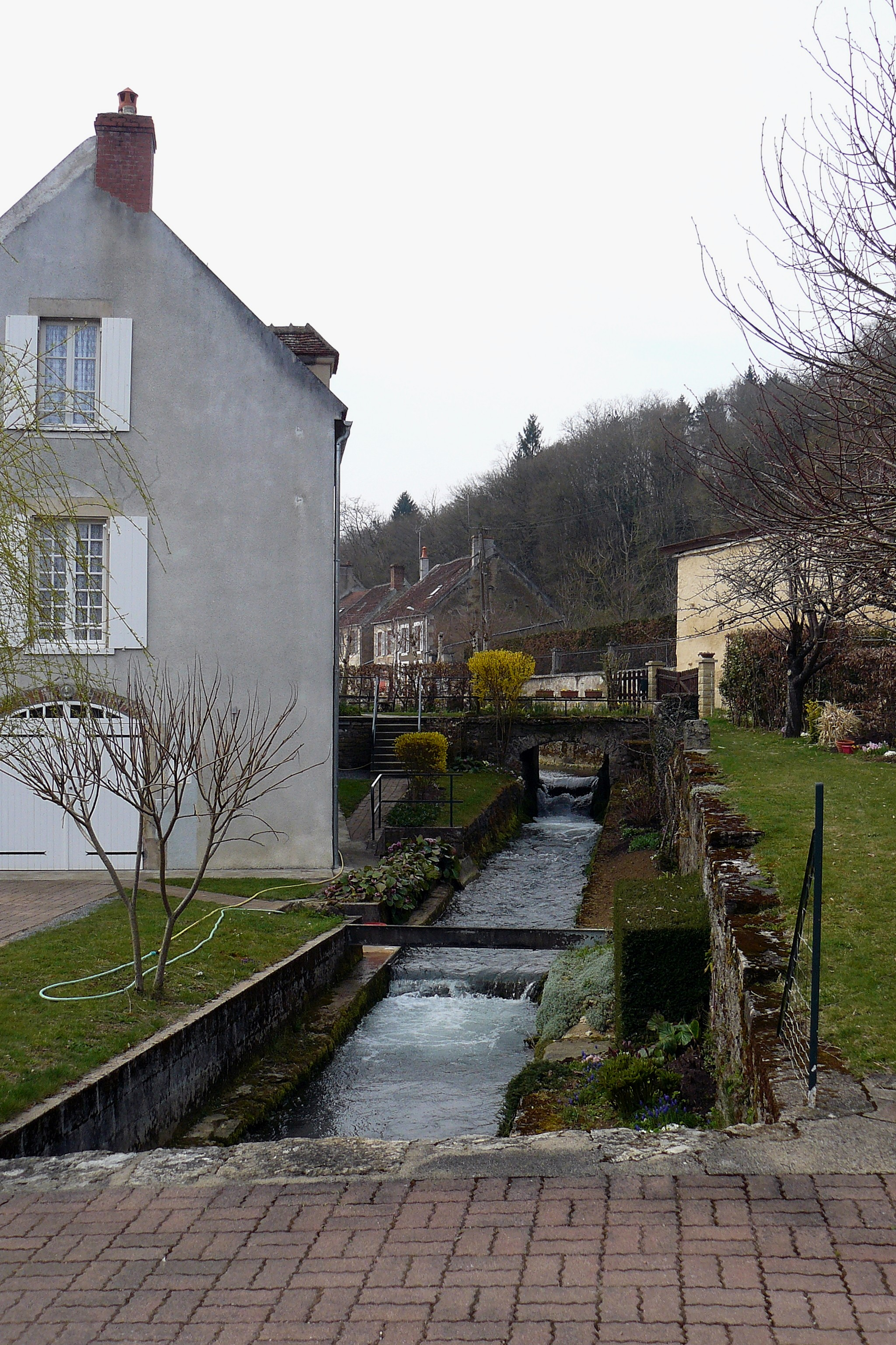 La rivière Sauzay à La Chapelle-Saint-André (Nièvre, France)